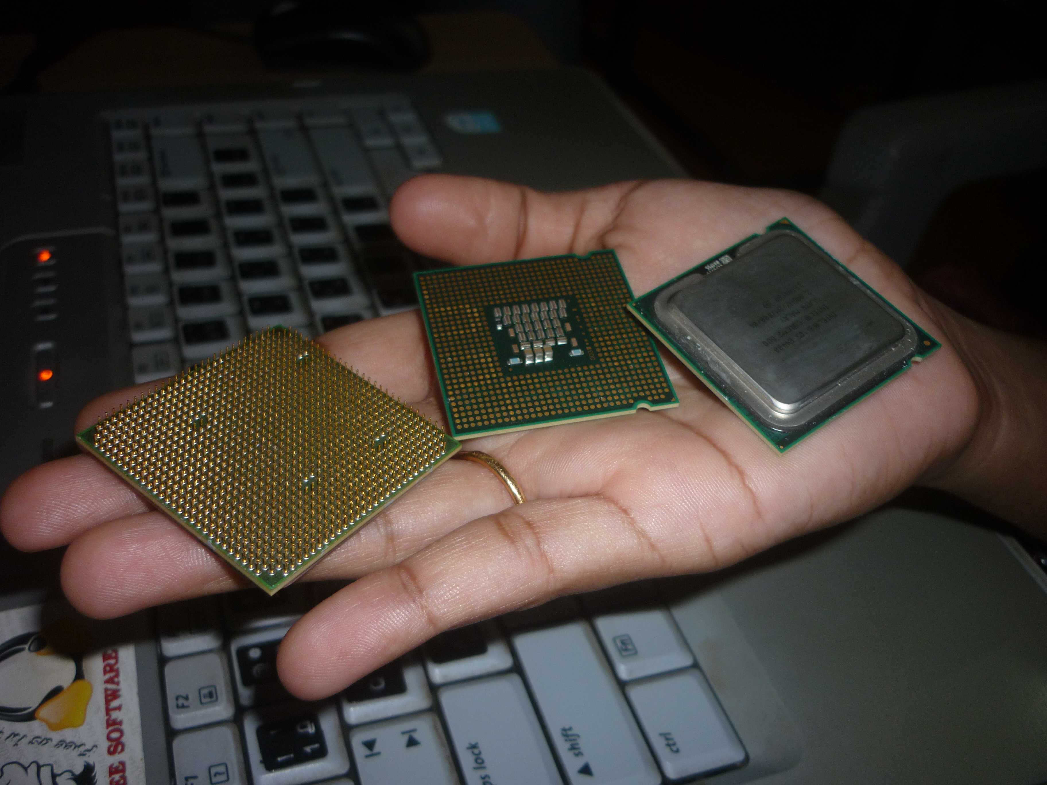 കമ്പ്യൂട്ടറിന്റെ മർമ്മപ്രധാന ഘടകമായ സെൽട്രൽ പ്രൊസസ്സിങ്ങ് യൂണിറ്റിനെ(CPU) സം‌യോജിപ്പിച്ച് ഒരു ഇന്റഗ്രേറ്റഡ് സർക്യൂട്ടിൽ അടക്കം ചെയ്തിരിക്കുന്നതാണ് മൈക്രോപ്രൊസസ്സറുകൾ.